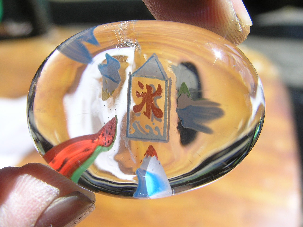 ガラス細工 長野県諏訪市